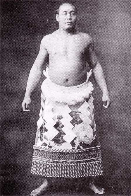 the 22nd Yokozuna, Tachiyama minemon（第22代横綱 太刀山峯右エ門）